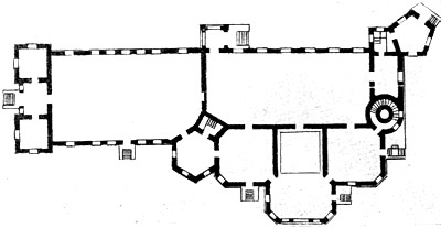 І. Старов. палац Г. Потьомкіна в Островках: план палацу